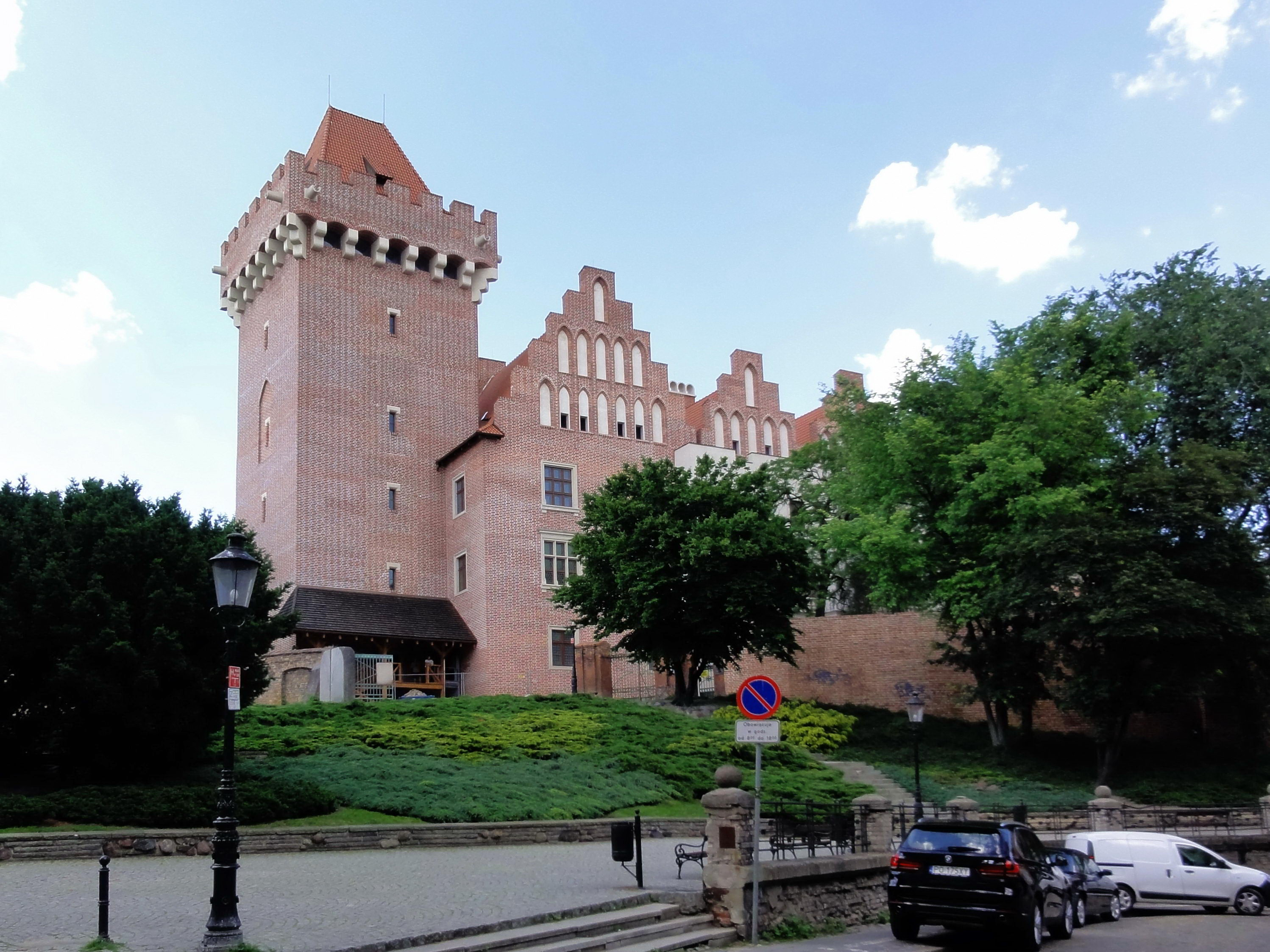 Zamek Królewski w Poznaniu